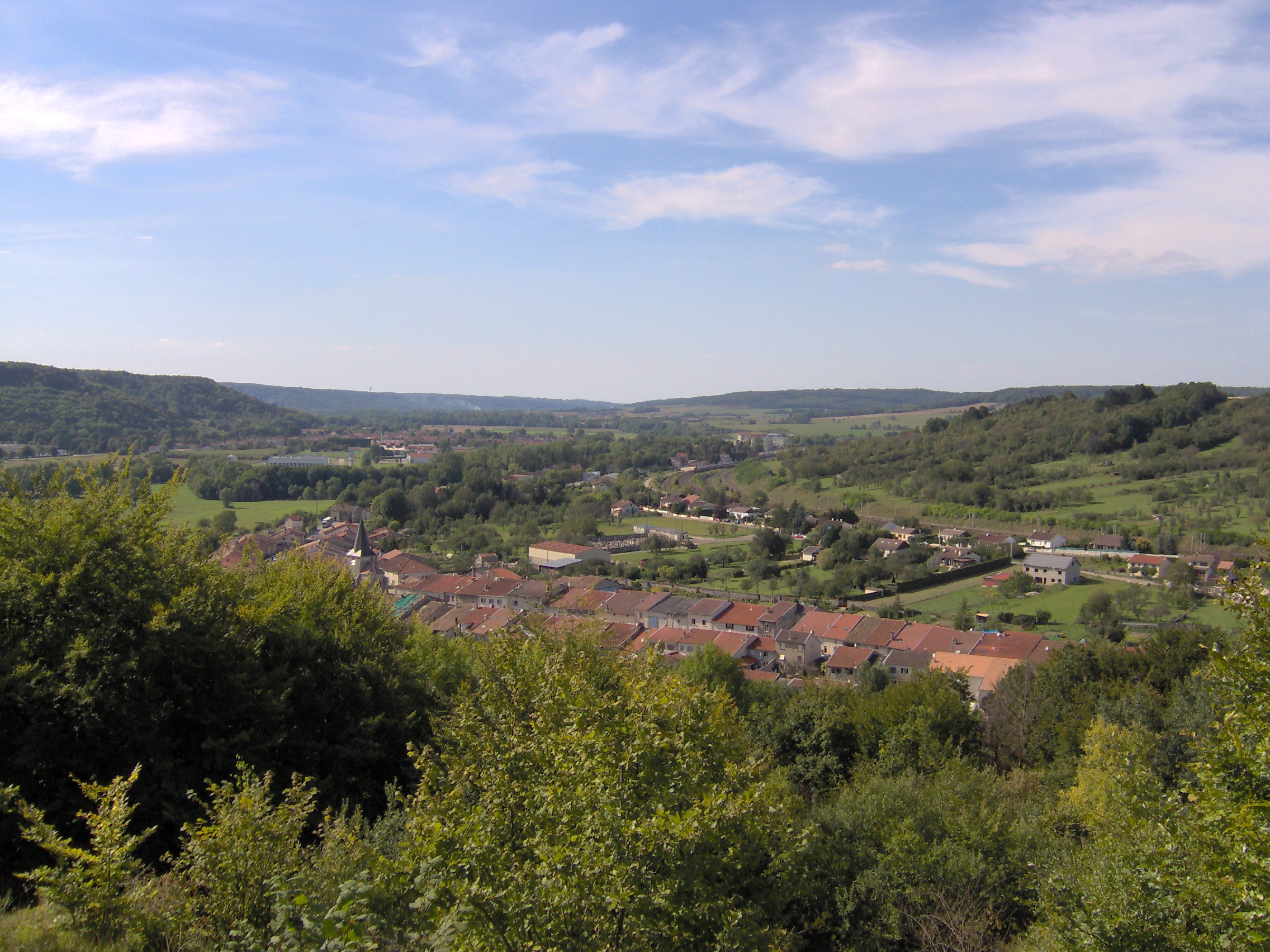 Vue de la Vallée de L'Ornain, dans la Meuse (55), depuis le Belvédère de la Vierge Noire à Nançois-sur-Ornain. Vue vers l'aval. Au premier plan : village de Nançois-sur-Ornain. Au deuxième plan : village de Tronville-en-Barrois. Photo prise le 28 août 2005.